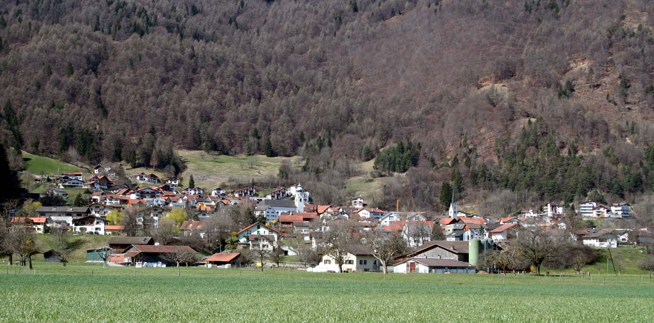 Untervaz